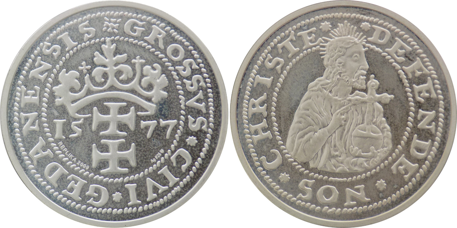 grosz 1577 Gdansk - replika